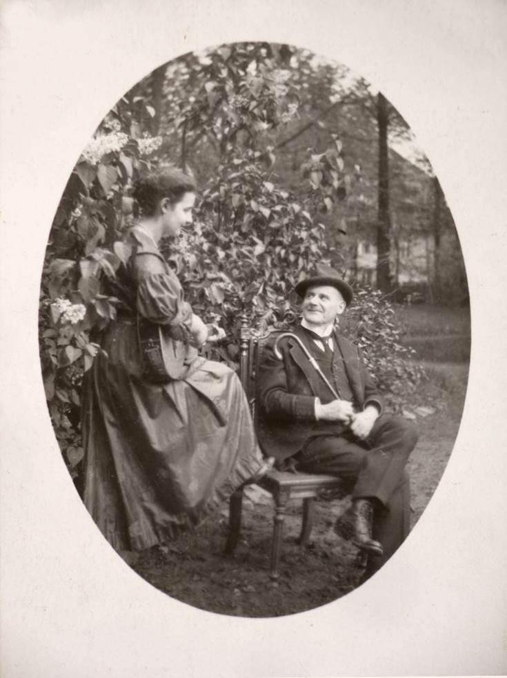 Georg Heimann und seine Tochter Paula von Reznicek